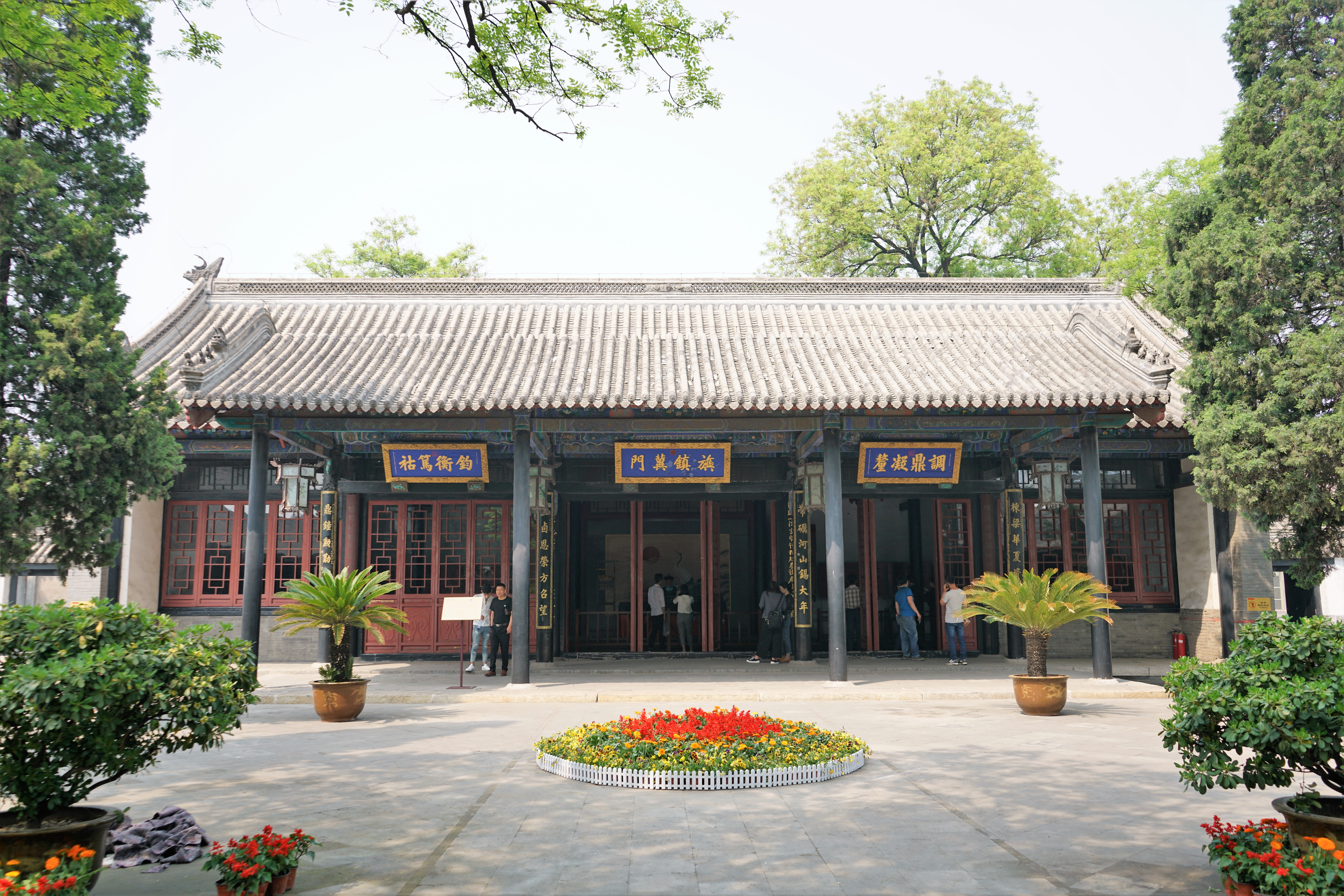 中文（中国大陆）: 直隶总督署 大堂